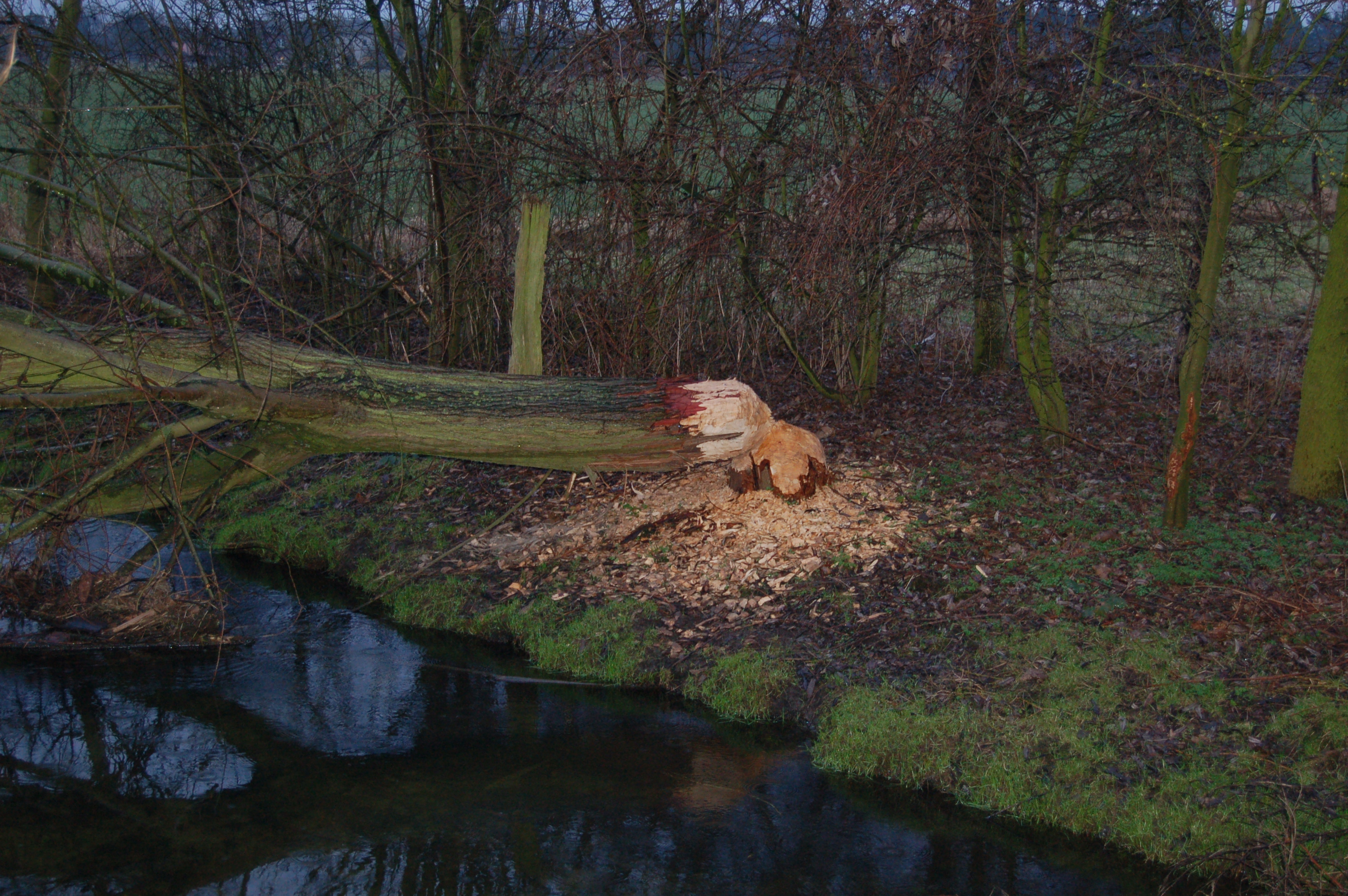 Von Biber gefällter Baum am Schaafbach, einem linken Zufluss zur Rur